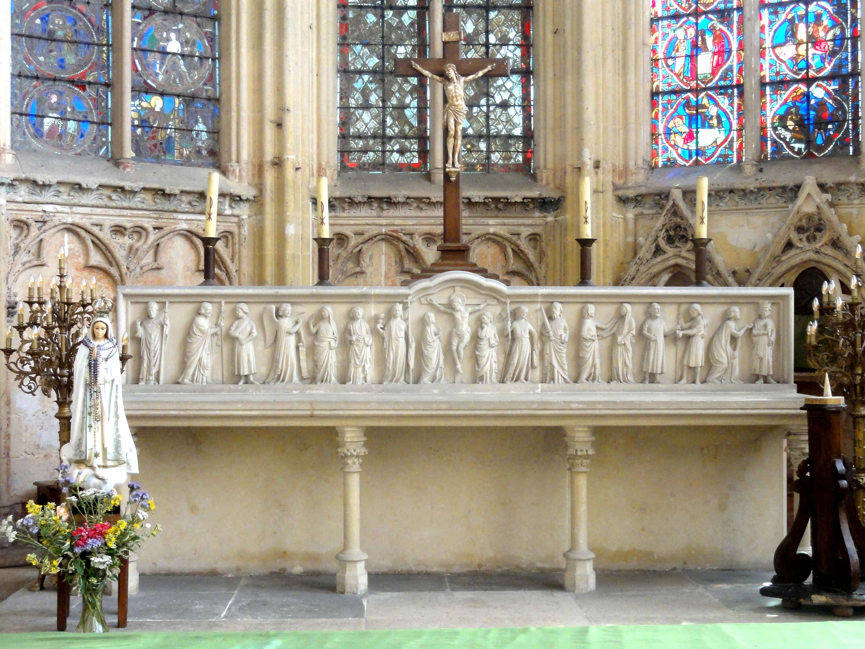 Sainte-chapelle, autel néo-gothique du XIXe siècle. Son modèle, l'original des années 1259-1267, fut envoyé au musée de Cluny par l'architecte É. Bœswilwald en 1846, et y est toujours exposé.